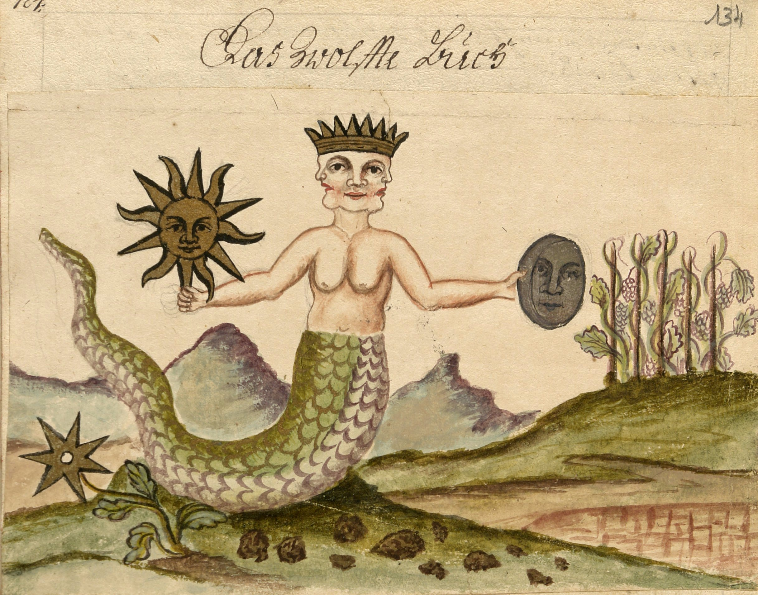 Immagine del manoscritto Zoroaster Clavis Artis, Ms-2-27, Biblioteca Civica Hortis, Trieste, vol. 3, pag. 134